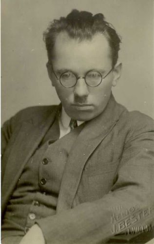 Anton Melik